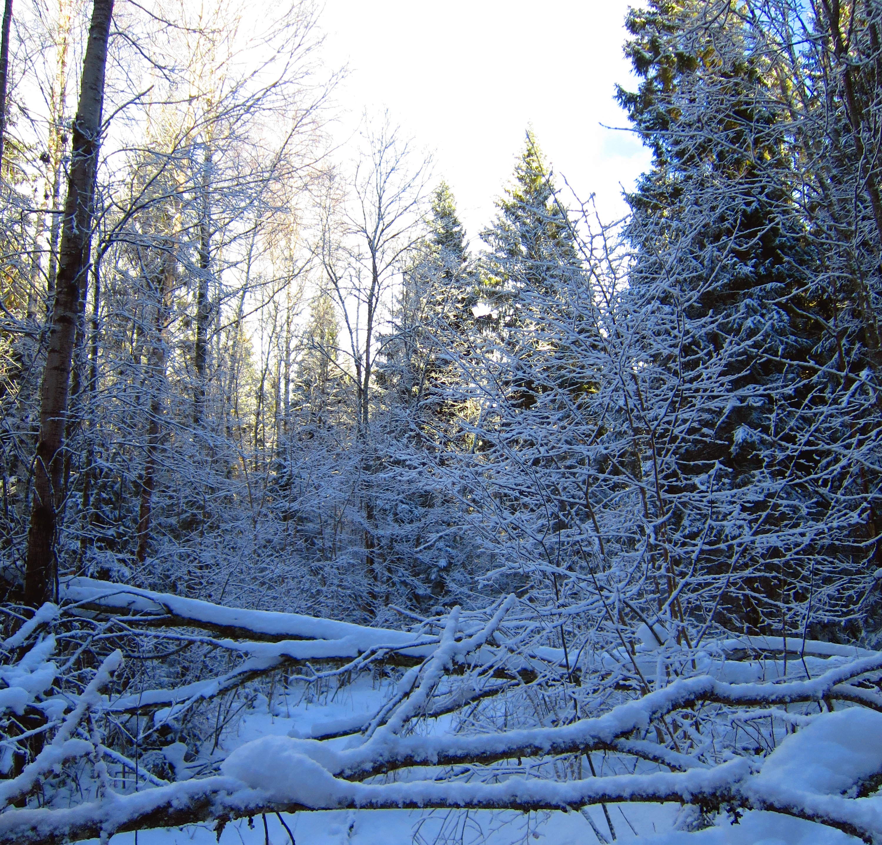 Mežs netālu no Baldones